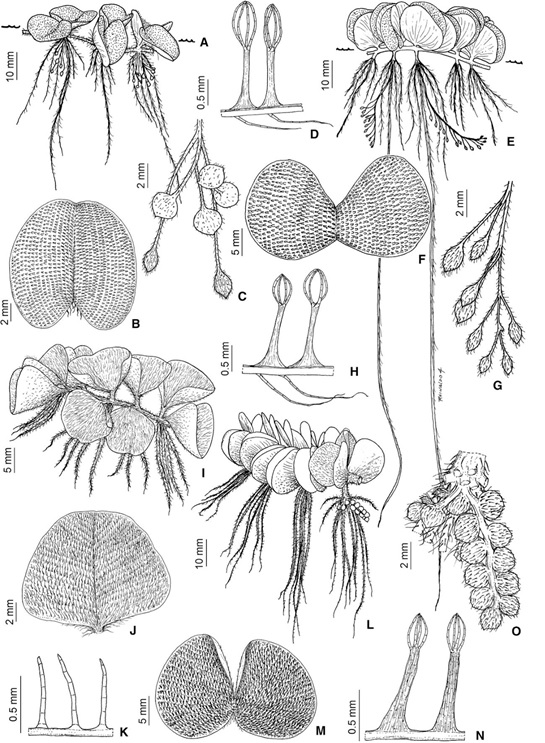 Morfologia Salviniaceae